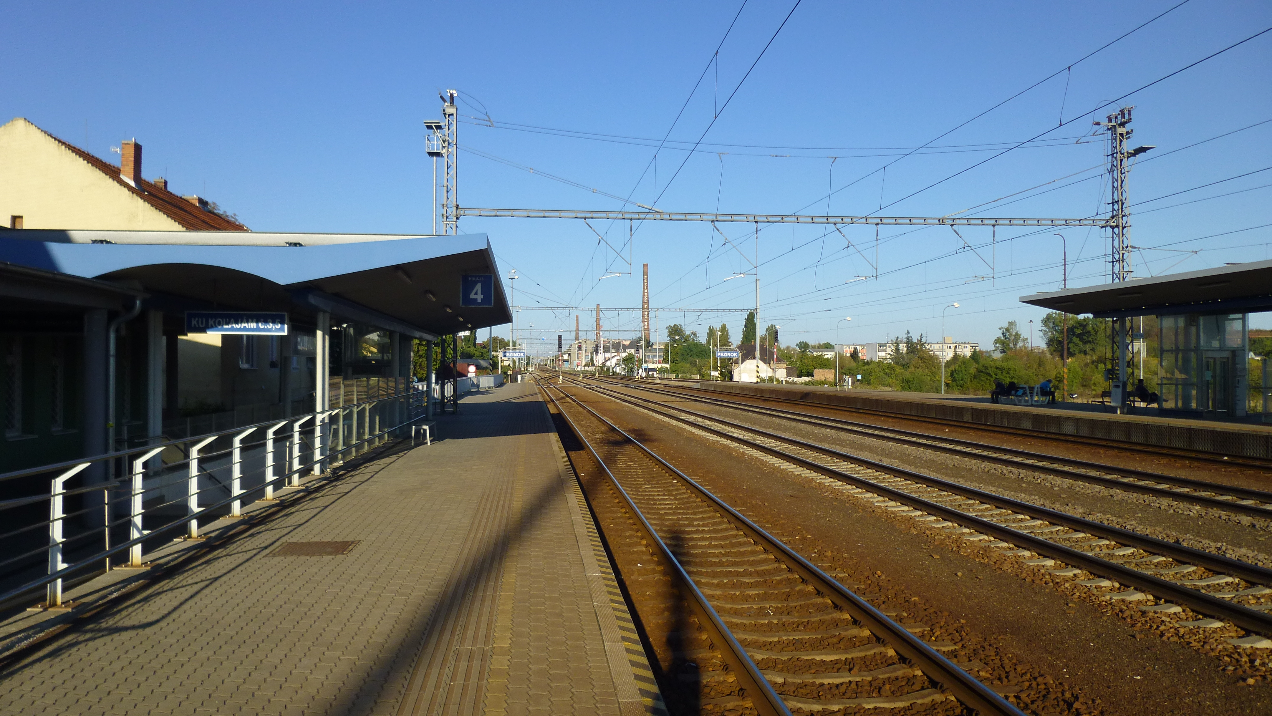 ŽELEZNIČNÁ STANICA PEZINOK